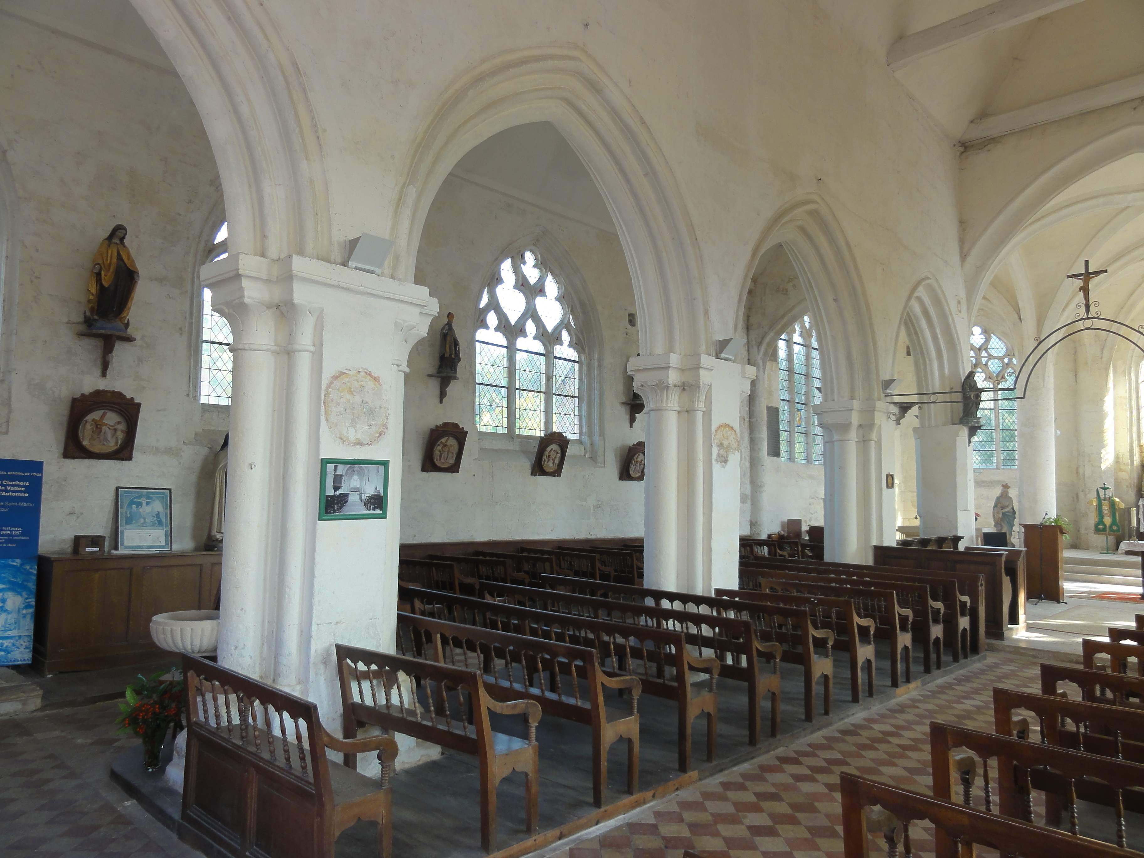 Intérieur de l'église - voir titre.